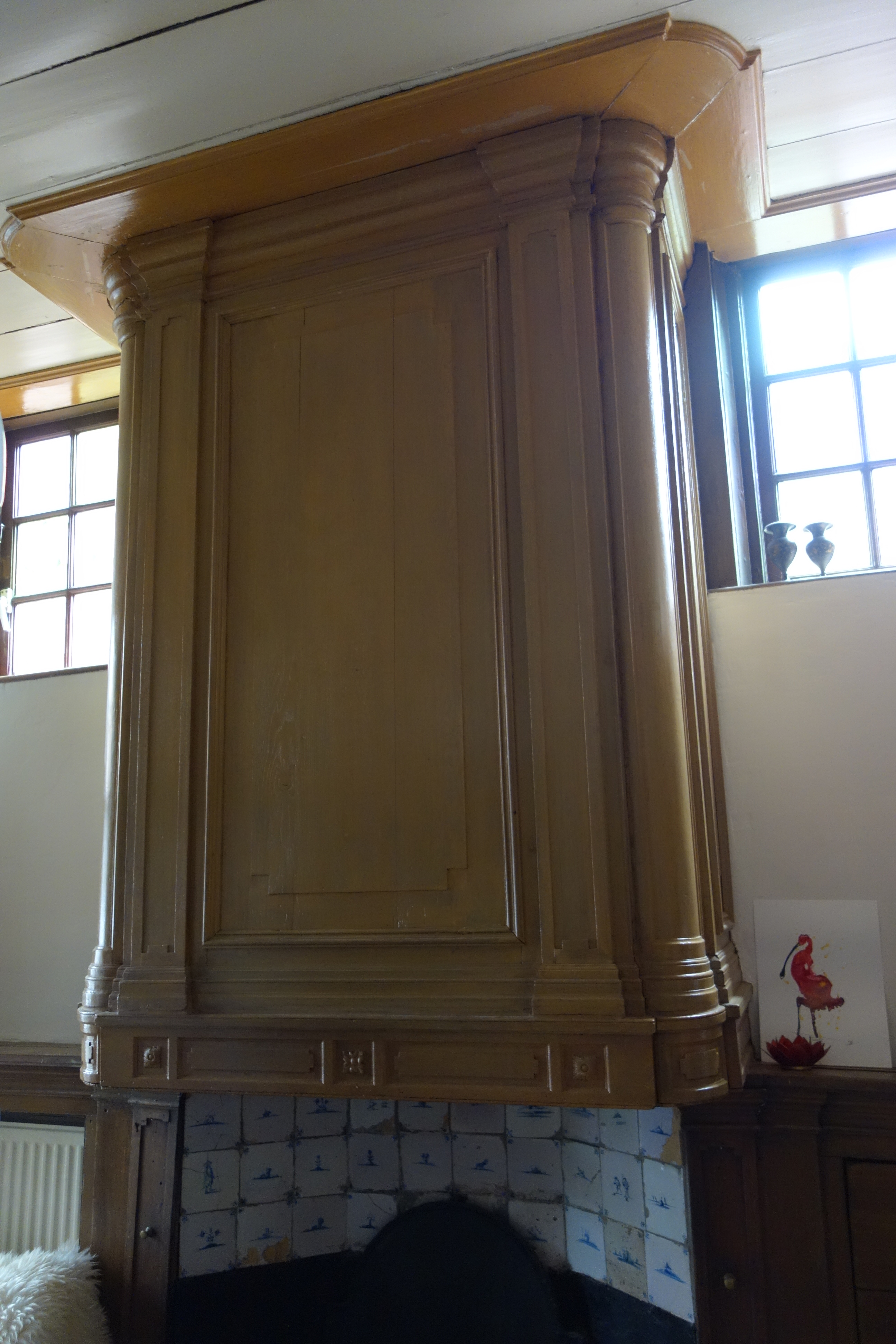 Houten schouw in de woonkamer (achterkamer) van Bierkade 10. De haard eronder is nog deels te zien, deze is betegeld.